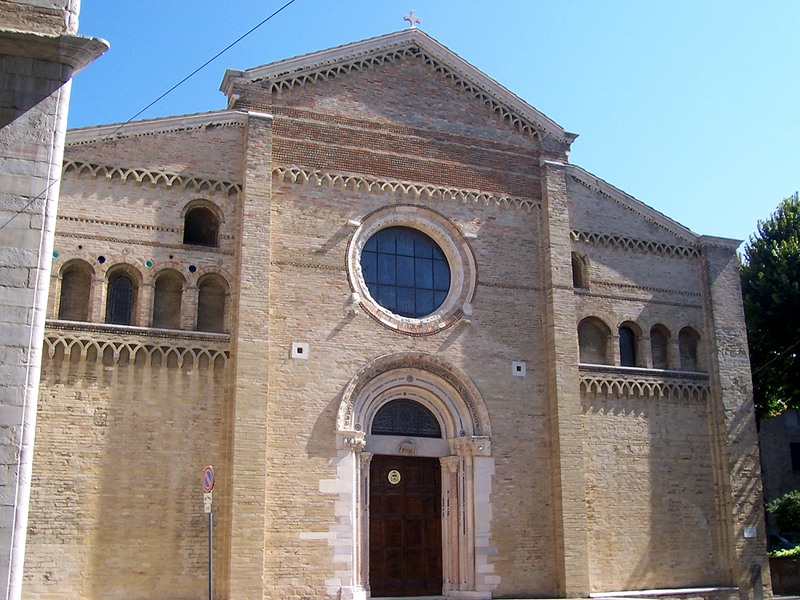 Fano - Cattedrale